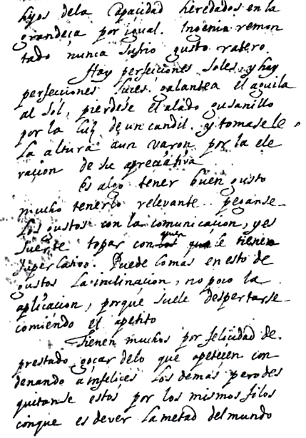 Manuscrito autógrafo de El Héroe de Baltasar Gracián. Corresponde al primor 5, (es decir, capítulo 5), «Gusto relevante». El texto correspondiente en su edición impresa, dice: «[...] hijos de la capacidad, heredados por igual en la excelencia. Ingenio sublime nunca crió gusto ratero. Hay perfecciones soles y hay perfecciones luces. Galantea el águila al sol, piérdese en él el helado gusanillo por la luz de un :candil, y tómasele la altura a un caudal por la elevación del gusto. Es algo tenerlo bueno, es mucho tenerlo relevante. Péganse los gustos con la comunicación, y es suerte topar con quien le tiene :superlativo. Tienen muchos por felicidad, de prestado será, gozar de lo que apetecen, condenando a infelices los demás, pero desquítanse estos :por los mismos filos, con que es de ver la mitad del mundo [...]». Wikisource (es). El héroe. Primor 5.